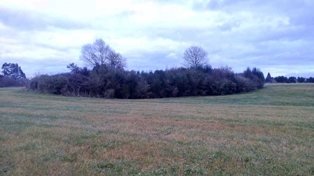 Vista do castro dos Muruxeses, Rodeiro.